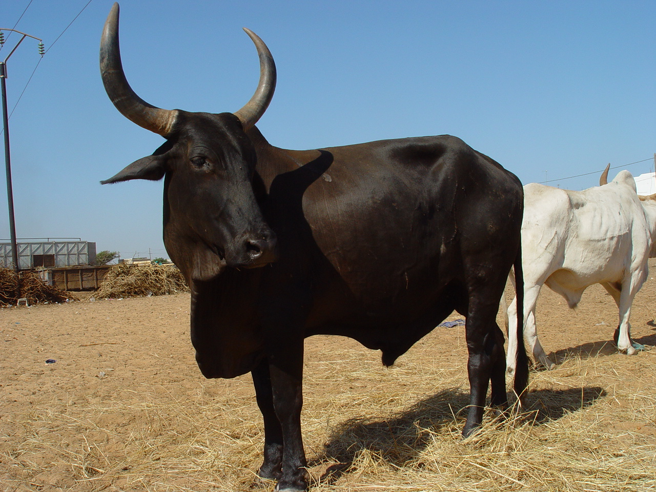 Scène de marché près de Thies, Sénégal, décembre 2002